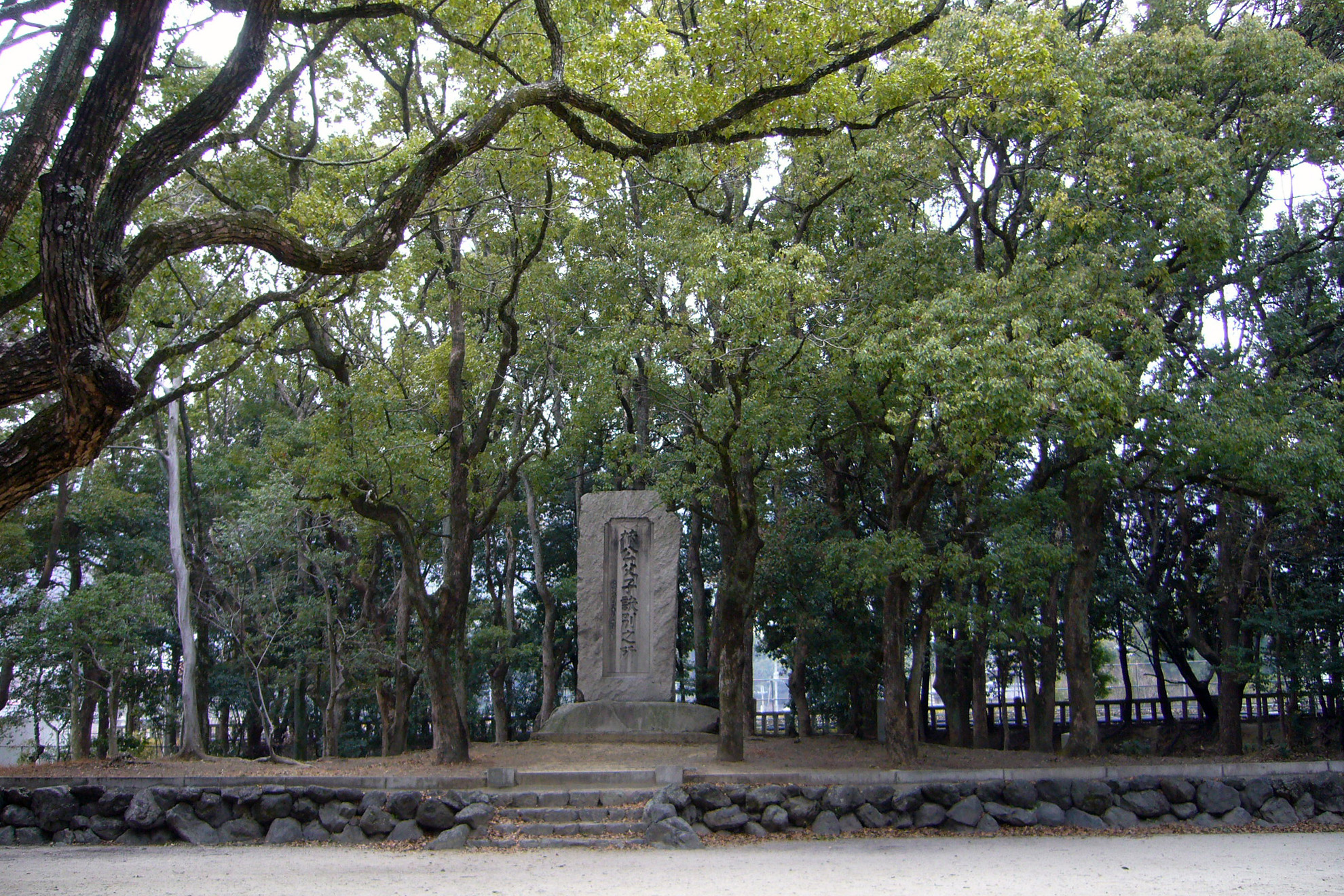 Sakurai-eki-ato in Shimamoto, Osaka prefecture, Japan